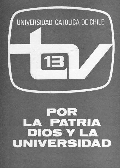 Logo de la Corporación de Televisión de la Pontificia Universidad Católica de Chile (Canal 13 Chile) entre 1968 y 1978.